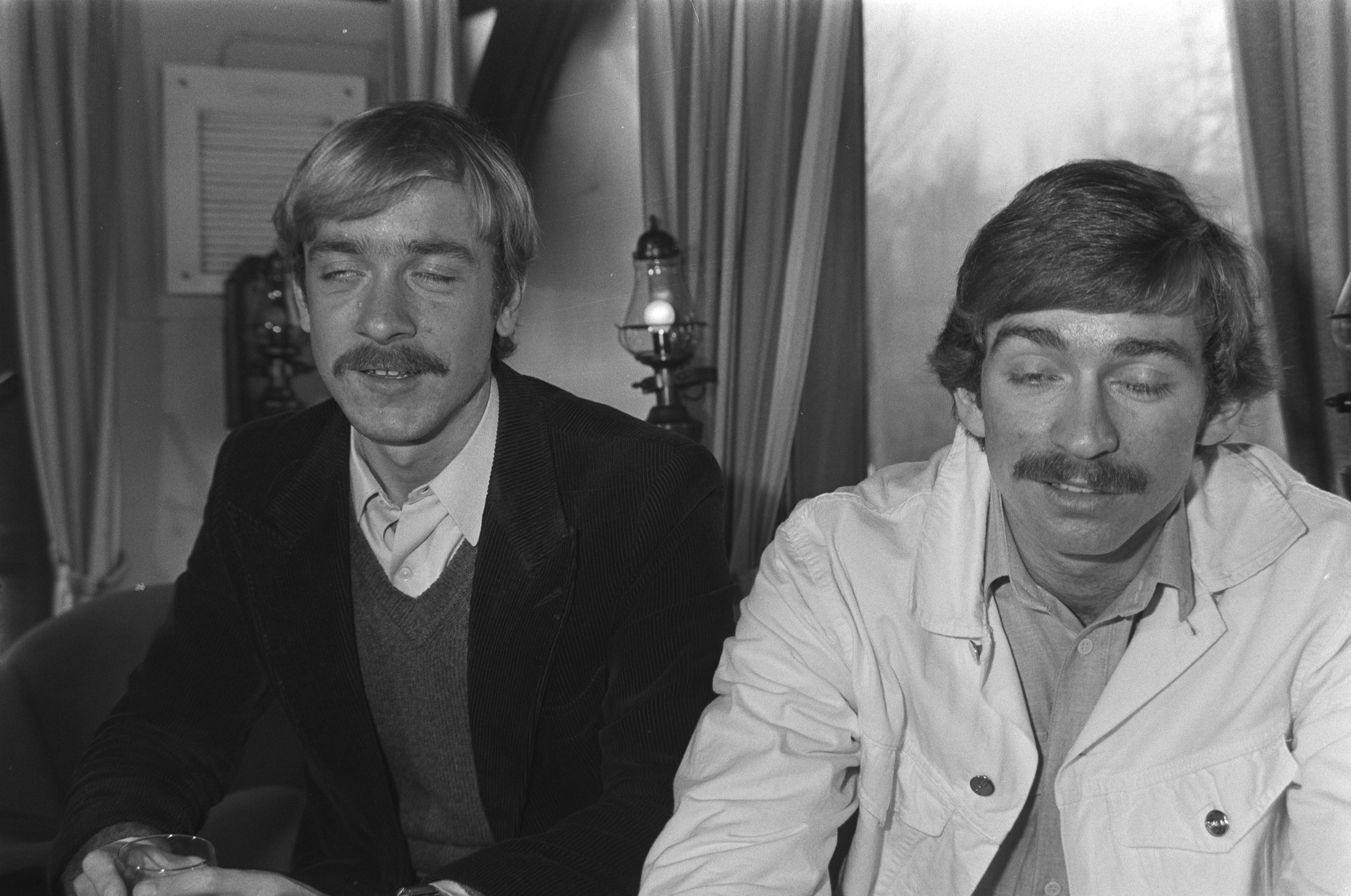 Collectie / Archief : Fotocollectie Anefo Reportage / Serie : [ onbekend ] Beschrijving : Uitreiking "Kruiwagen" en " Export Prijs" tijdens radioprogramma Open House . New Music Orchestra Datum : 31 december 1981 Trefwoorden : RADIOPROGRAMMAS, Uitreikingen Fotograaf : Dijk, Hans van / Anefo Auteursrechthebbende : Nationaal Archief Materiaalsoort : Negatief (zwart/wit) Nummer archiefinventaris : bekijk toegang 2.24.01.05 Bestanddeelnummer : 931-8890